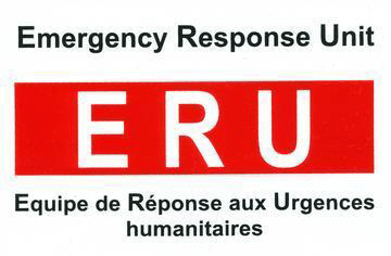 Logo de l'acronyme ERU